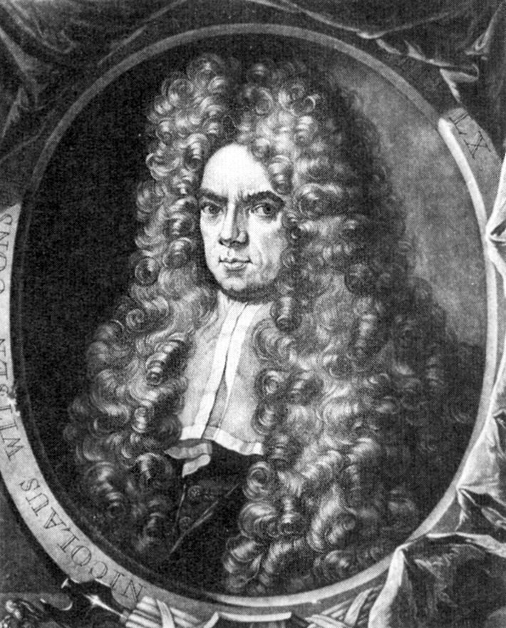 Nicolaas Witsen (1674-1717)